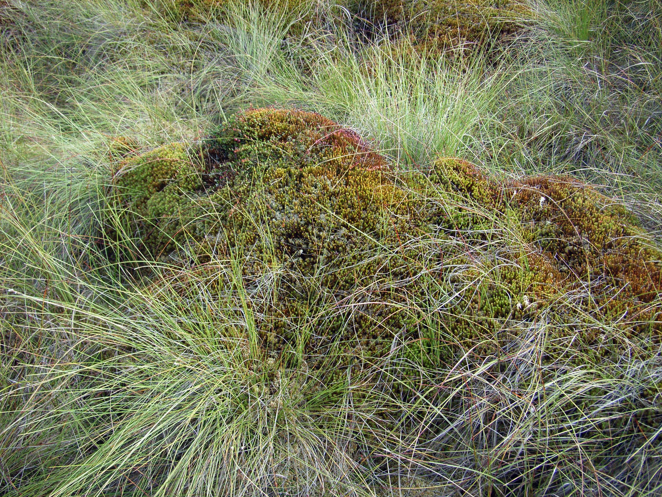 Bult-Schlenken-Komplex in einem regerierenden Regenmoor in Nordwestdeutschland